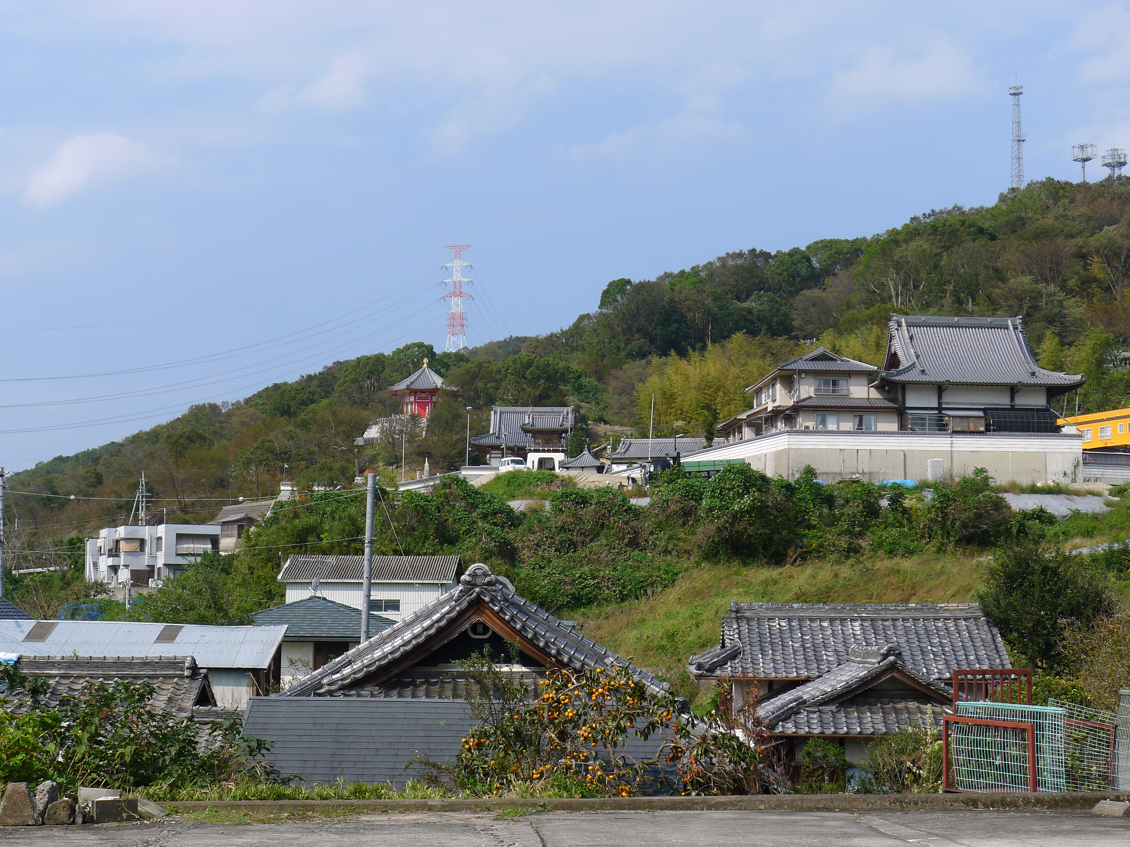 熊野古道紀伊路が通る湯屋谷集落（和歌山県和歌山市）